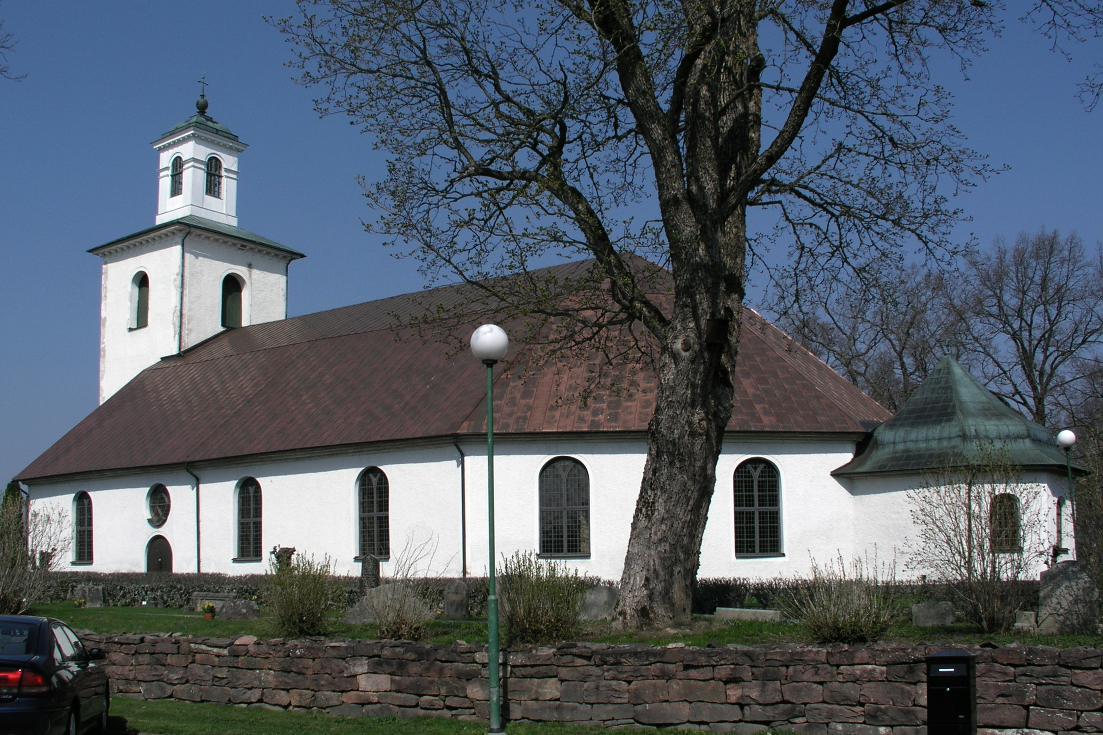 Väse kyrka, Diocese of Karlstad, Sweden.